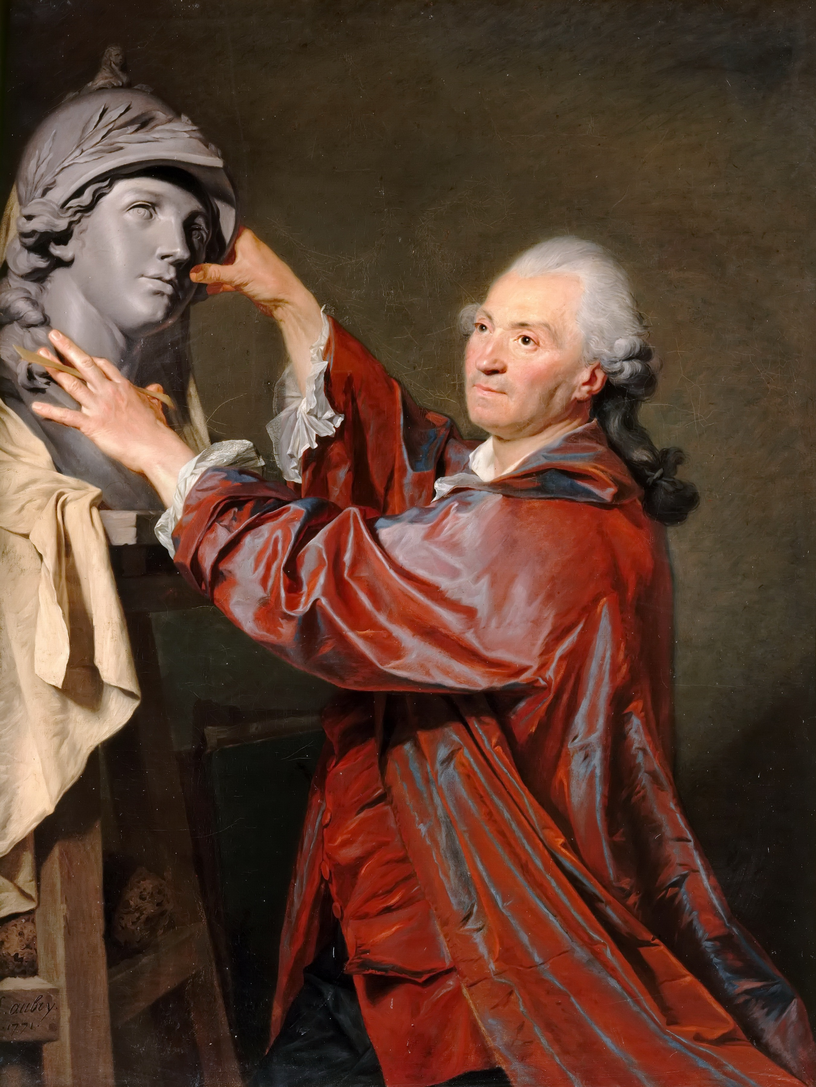 Portrait of Louis-Claude Vassé (1716-1772), French sculptor